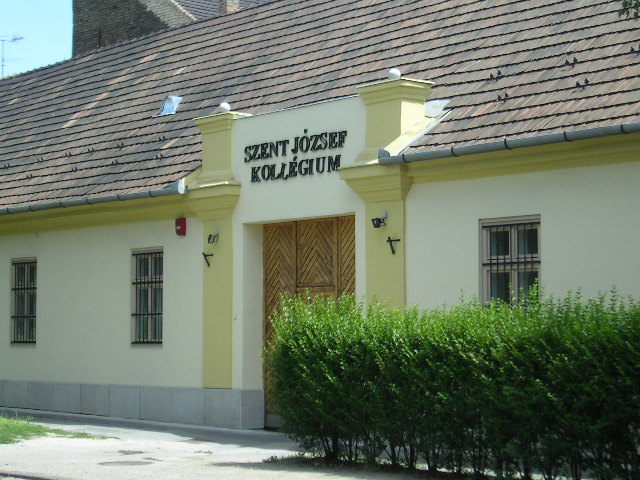 Szent József Kollégium (Vác, Hondvéd utca)